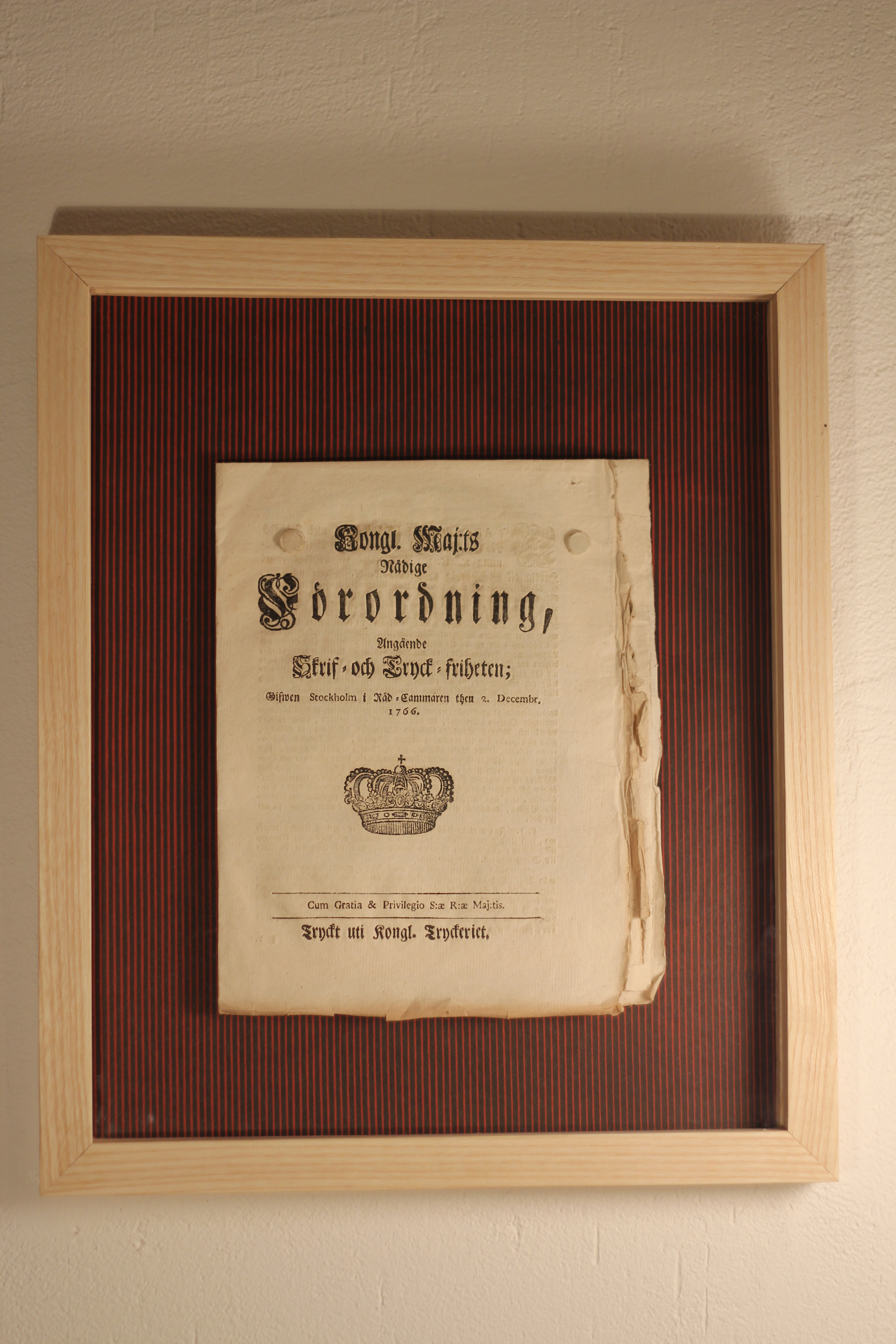 Oskuret original av Tryckfrihetsförordningen från 1766 i öppningsbar ram, design och tillverkning: Mats Elzén, Stockholm 2017